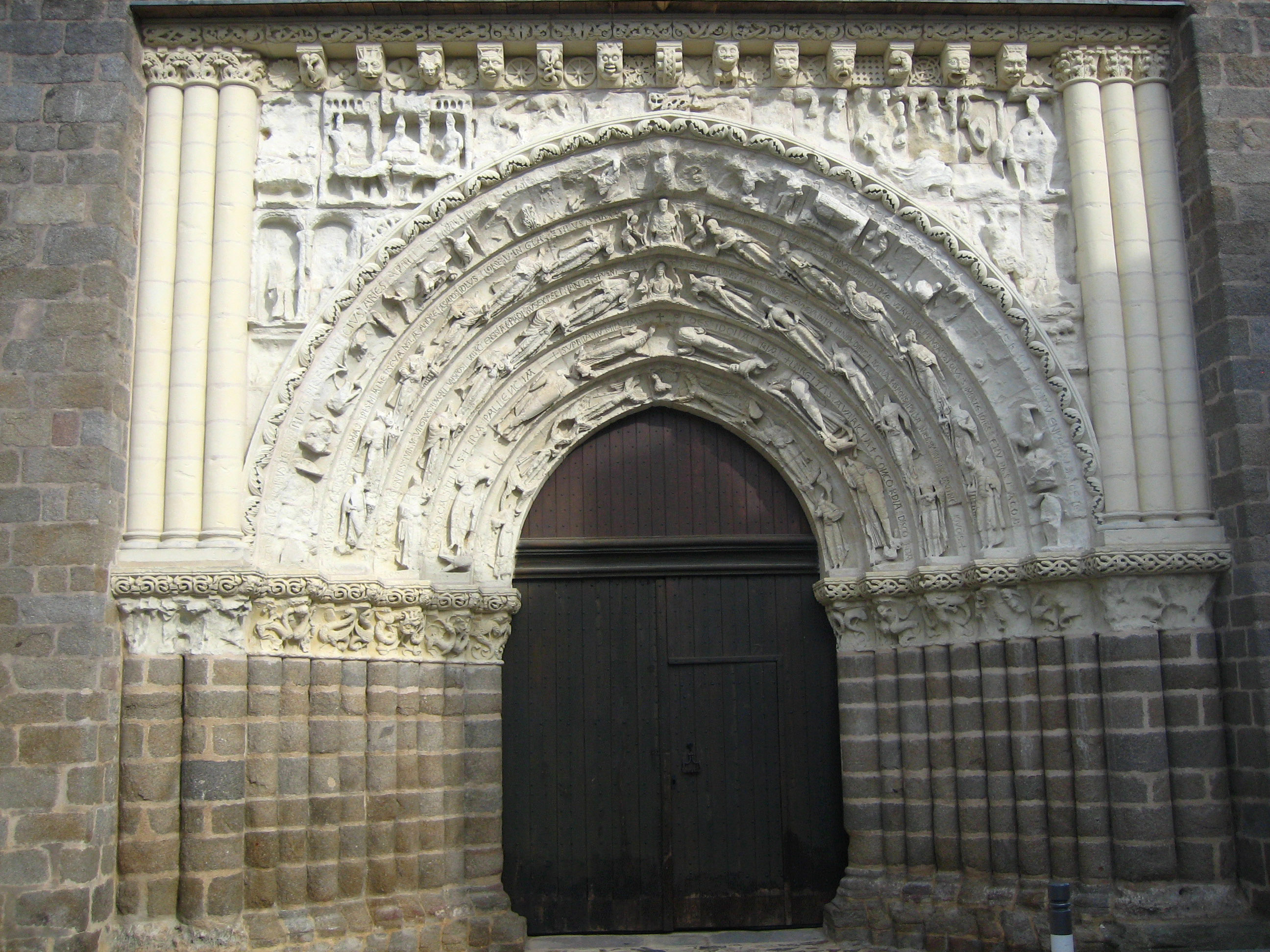 Église Saint-Gilles d'Argenton-Château .